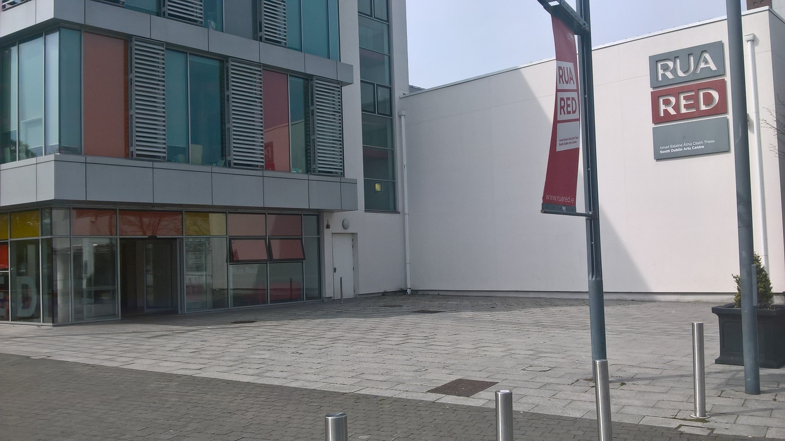 Ionad Ealaíone Rua Red, Tamhlacht.